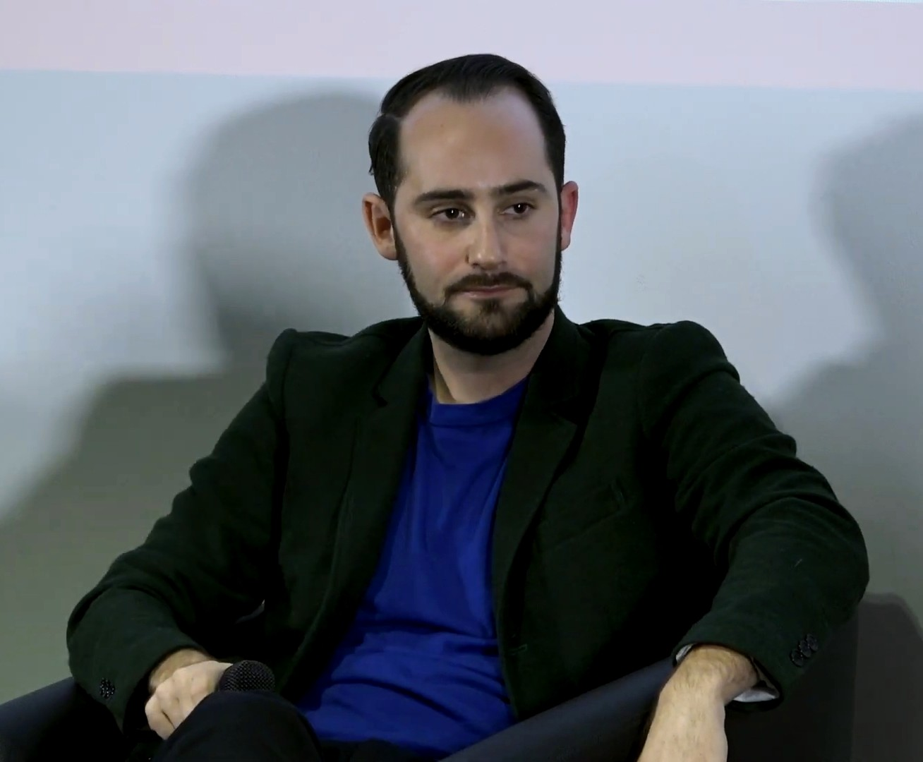 Markt und Herrschaft in der Ökonomie der Unknappheit. Luxemburg Lecture von Philipp Staab Berlin, 31.10.2019 Philipp Staab beleuchtet den digitalen Kapitalismus aus unterschiedlichen Perspektiven, um ihn präziser auf den Begriff zu bringen. Er zeigt, wie digitale Überwachungs- und Bewertungspraktiken in immer mehr Bereiche der Wirtschaft vordringen und dabei die soziale Ungleichheit verschärfen. Das Spezifische am digitalen Kapitalismus, so Staab, ist die Herausbildung «proprietärer Märkte»: Kam es früher darauf an, Dinge herzustellen und mit Gewinn zu verkaufen, geht es im Zeitalter der Unknappheit um das Eigentum an den Märkten selbst. Philipp Staab gibt in seiner Lecture schwerpunktmäßig auf die Herausbildung von Ungleichheits und Klassenstrukturen im Gegenwartskapitalismus ein. Weitere Informationen